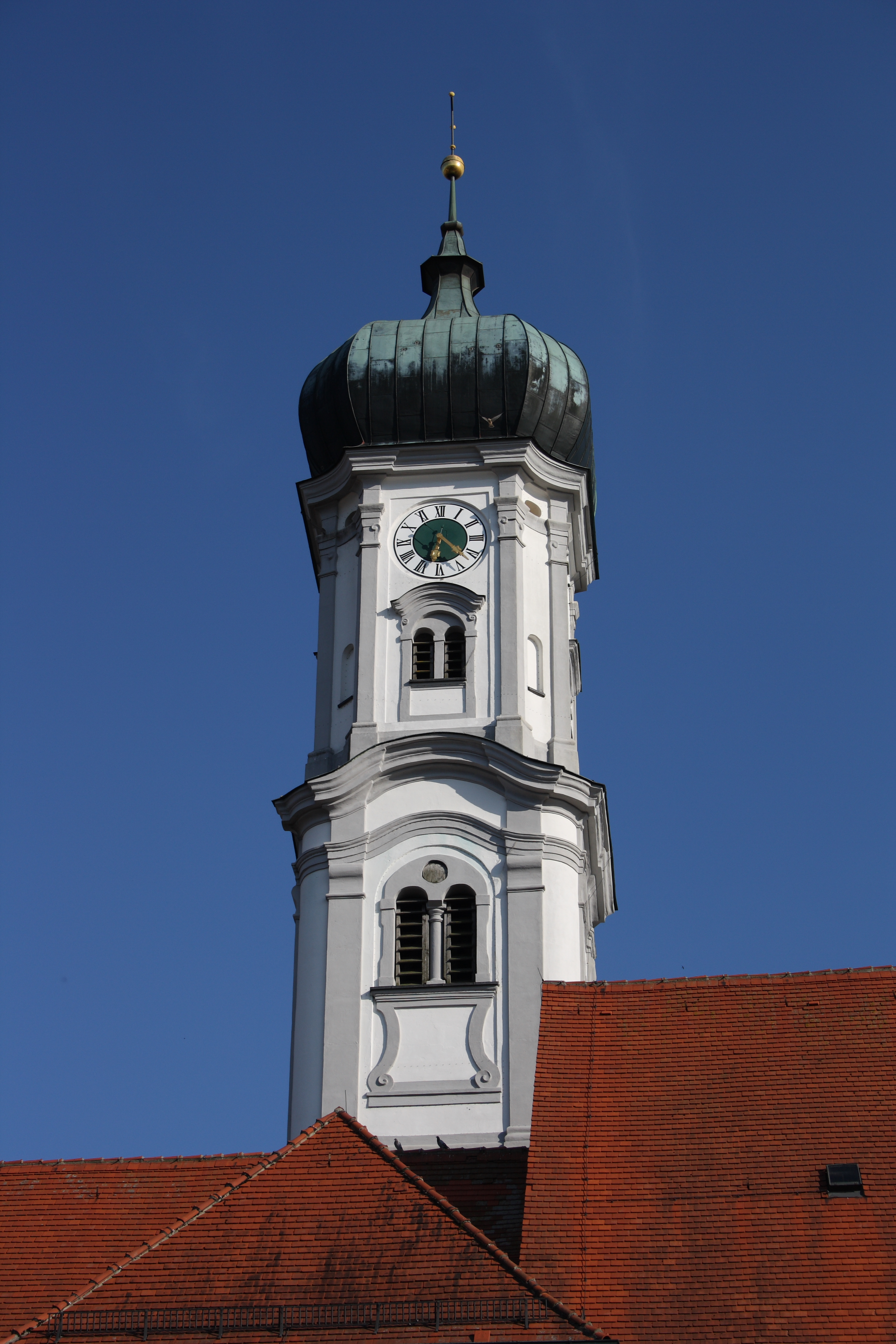 Katholische Pfarrkirche St. Peter in Tapfheim im Landkreis Donau-Ries (Bayern), Zwiebelturm